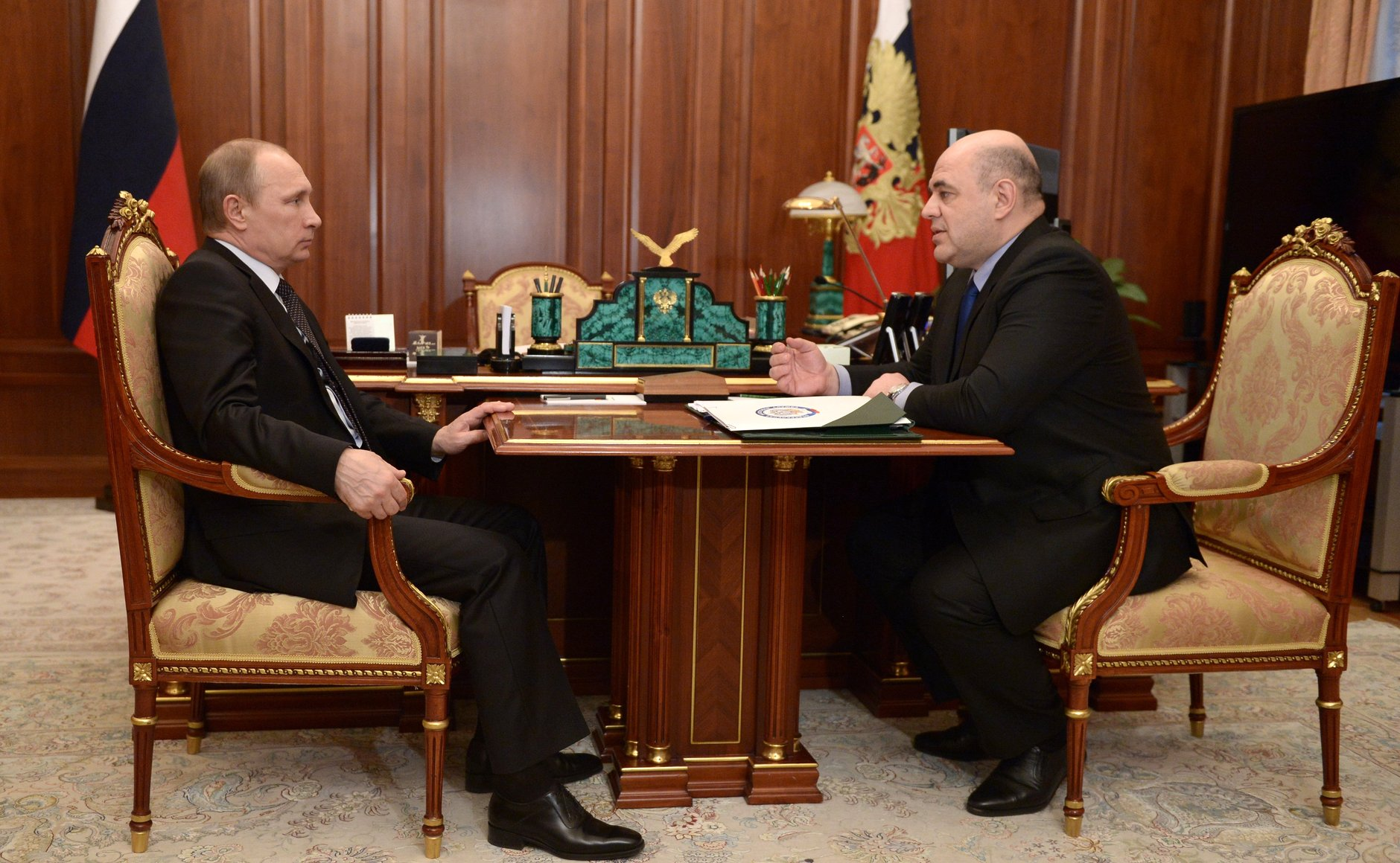 Рабочая встреча Владимира Путина с руководителем Федеральной налоговой службы Михаилом Мишустиным.